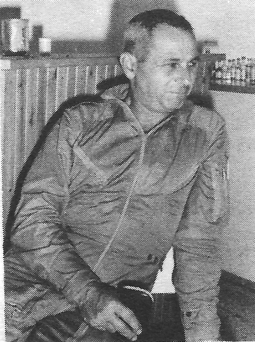 סא"ל אלי איל, 1967